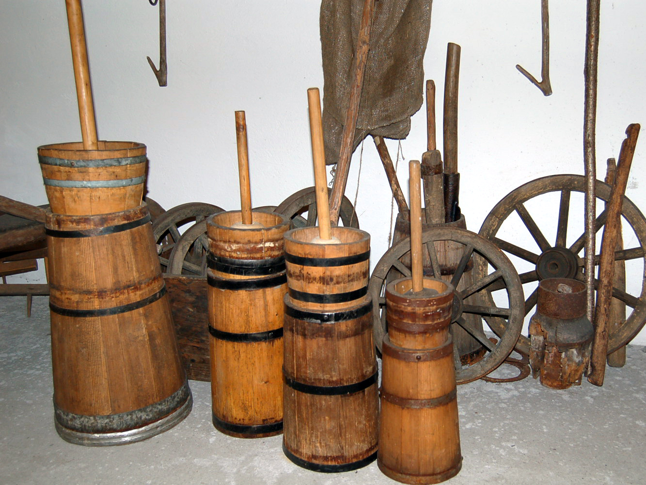 Maślnice - prowizoryczna ekspozycja w Muzeum Regionalne "Kamojówka" w Suszcu